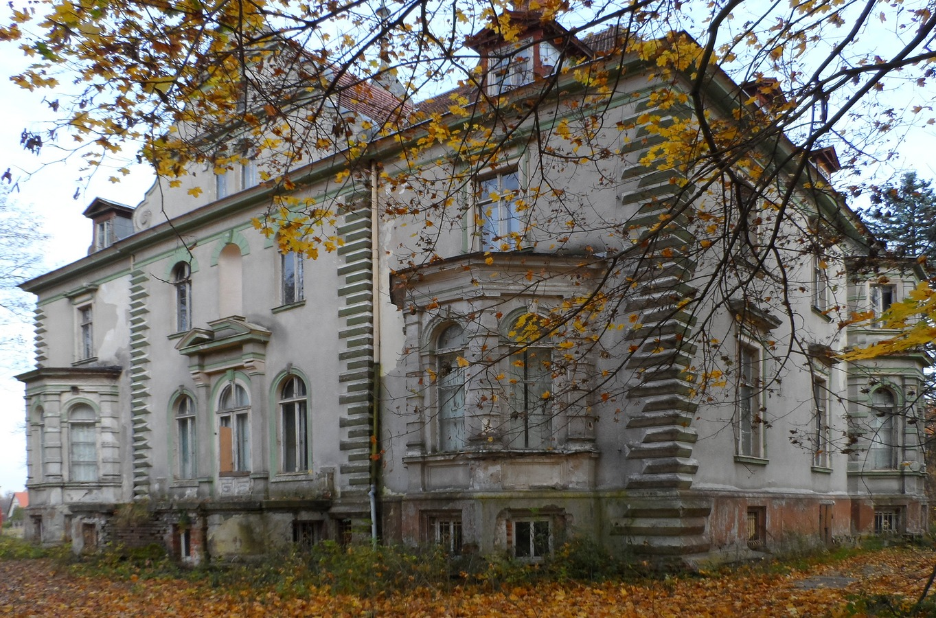 Kruszewo, pałac, 2 poł. XIX